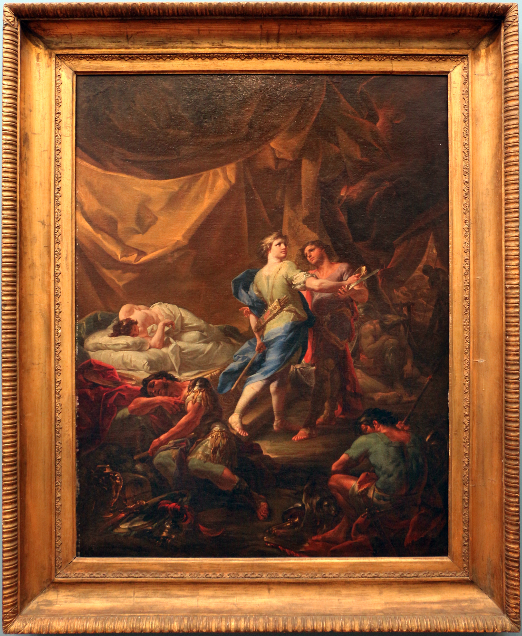 Palazzo della città metropolitana di Bari This is a photo of a monument which is part of cultural heritage of Italy.